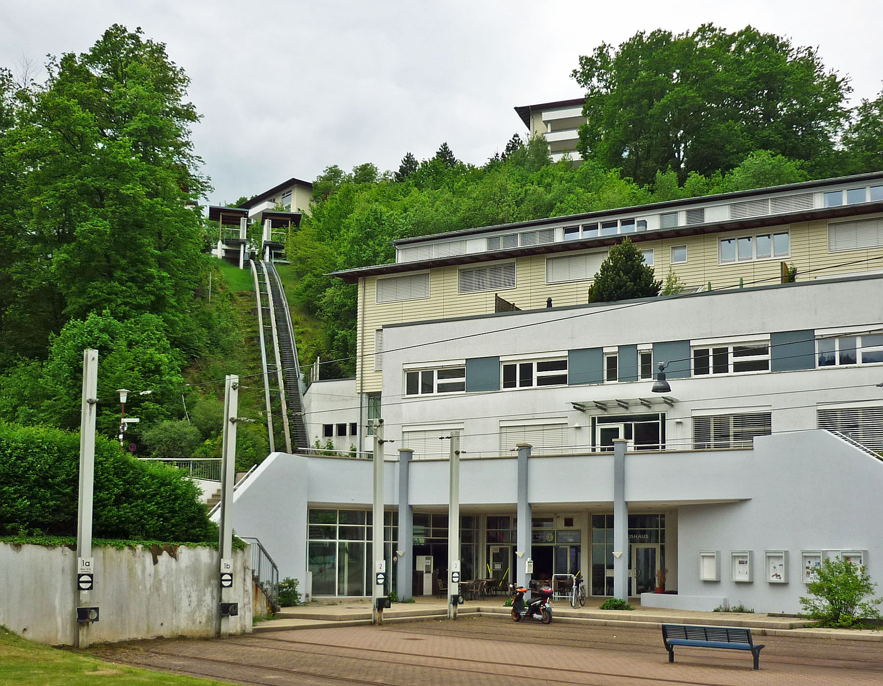 Seilbahn zur Falkenburg-Klinik in Bad Herrenalb, Lkr. Calw (Württemberg)